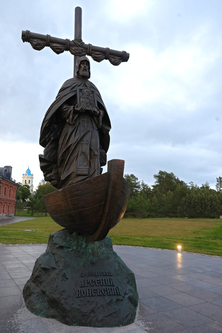 Памятник основателю Коневского Рождество-Богородичного монастыря